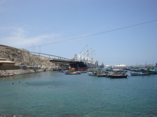 Puerto de Matarani 2013